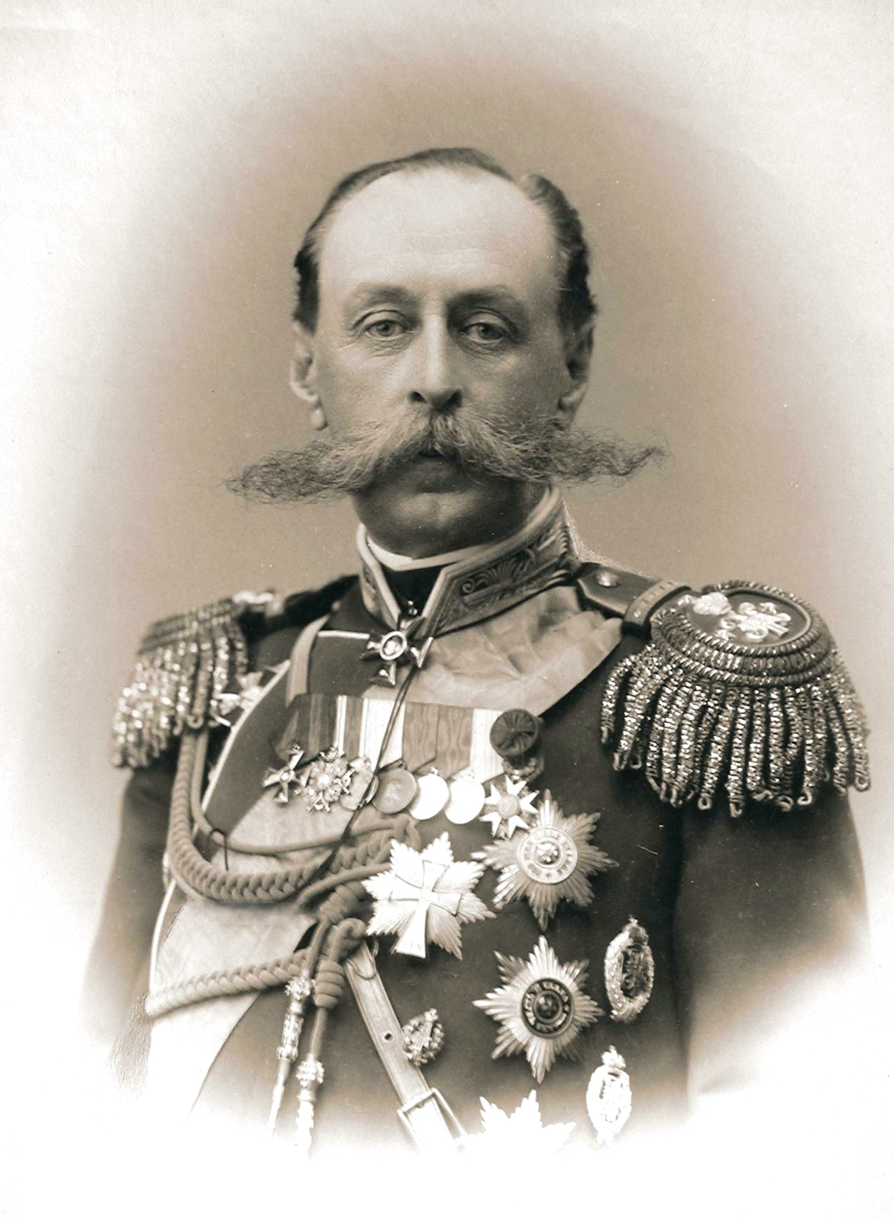 Фредерикс, Владимир Борисович